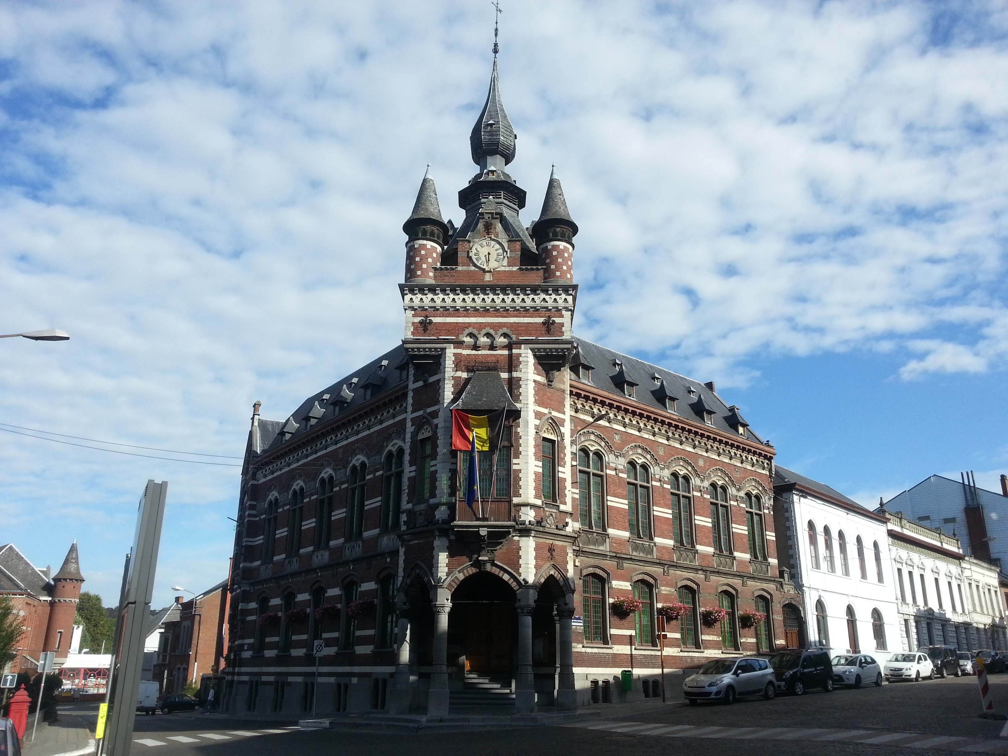 L'hôtel de ville (M) et établissement d'une zone de protection (ZP)